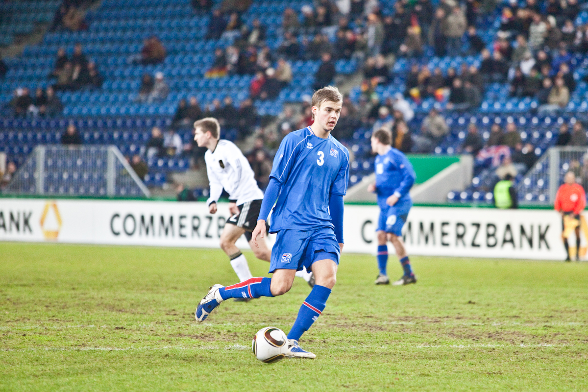 Hólmar Örn Eyjólfsson im U-21-Länderspiel gegen Deustchland.